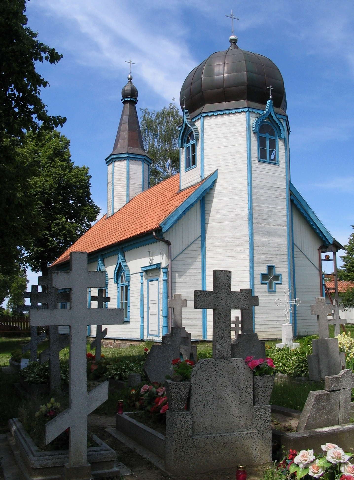 Wojnowo 24 - dawna molenna straroobrzędowców, obecnie cerkiew prawosławna pw. Zaśnięcia NMP, 1922-1927